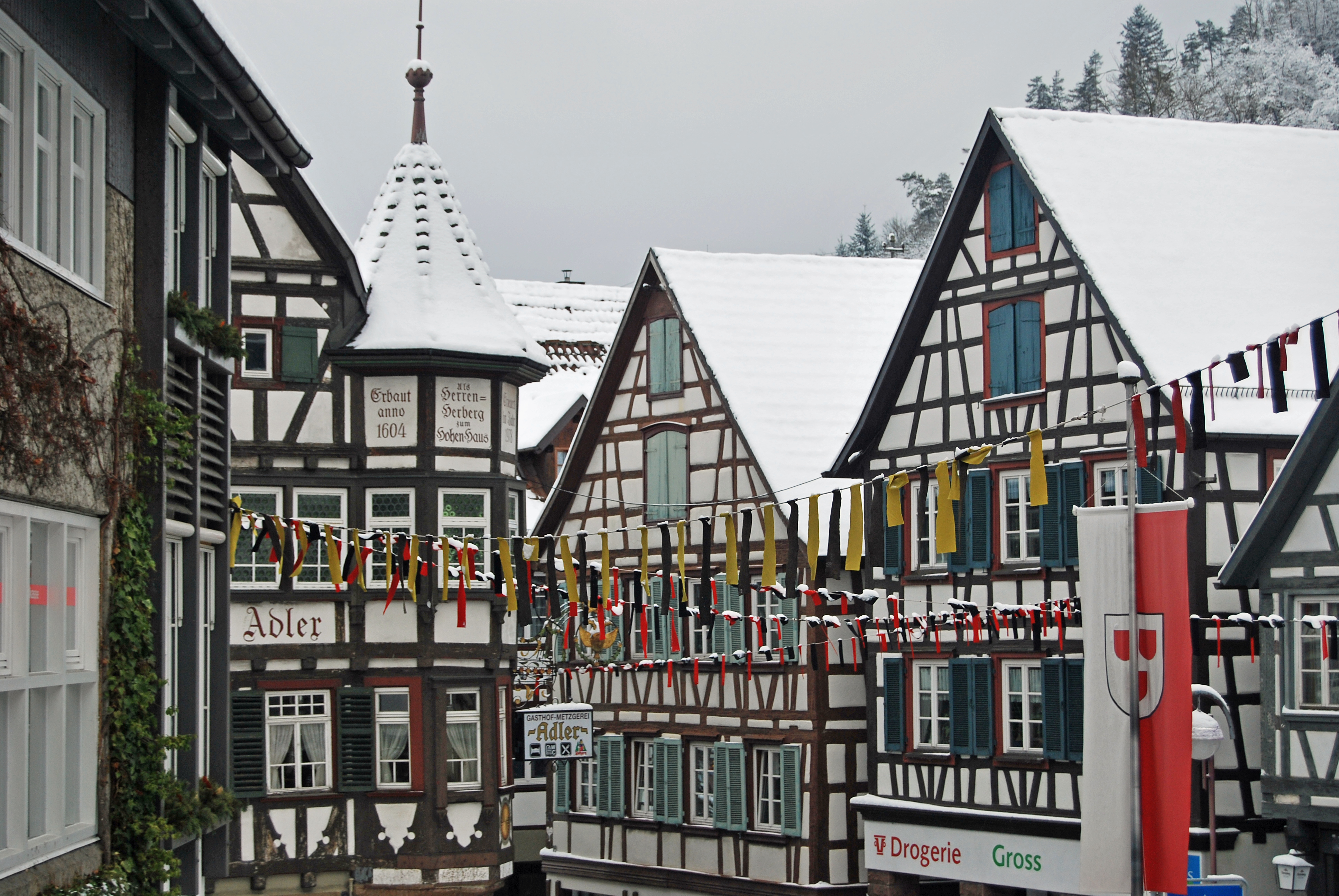 Altstadt von Schiltach im Winter